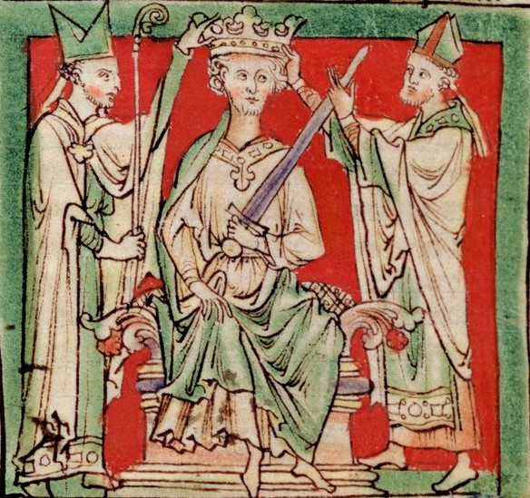 Korunovace Štěpána Anglického